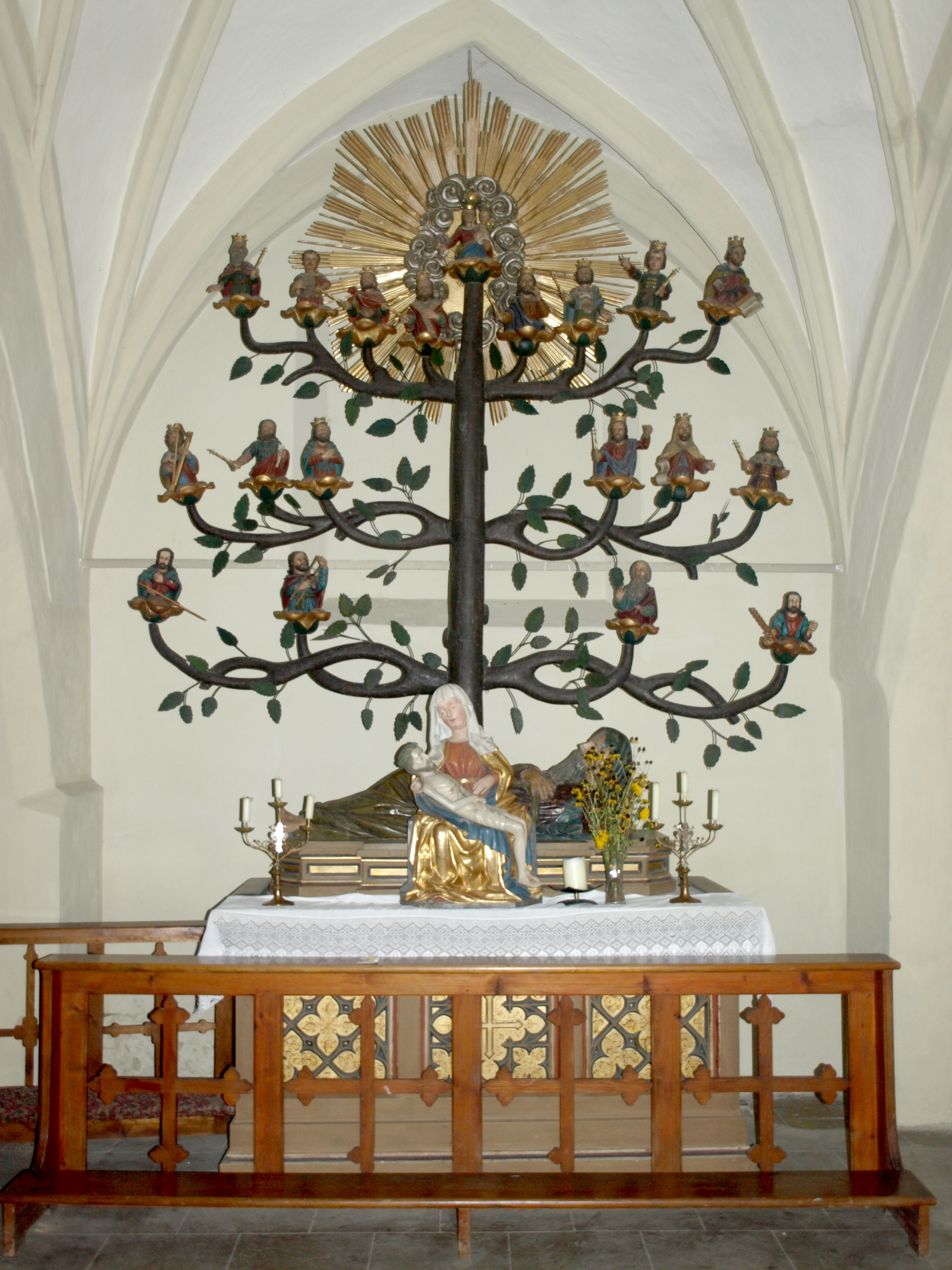 Kath. Pfarrkirche hll. Peter und Paul, ehem. Stiftskirche